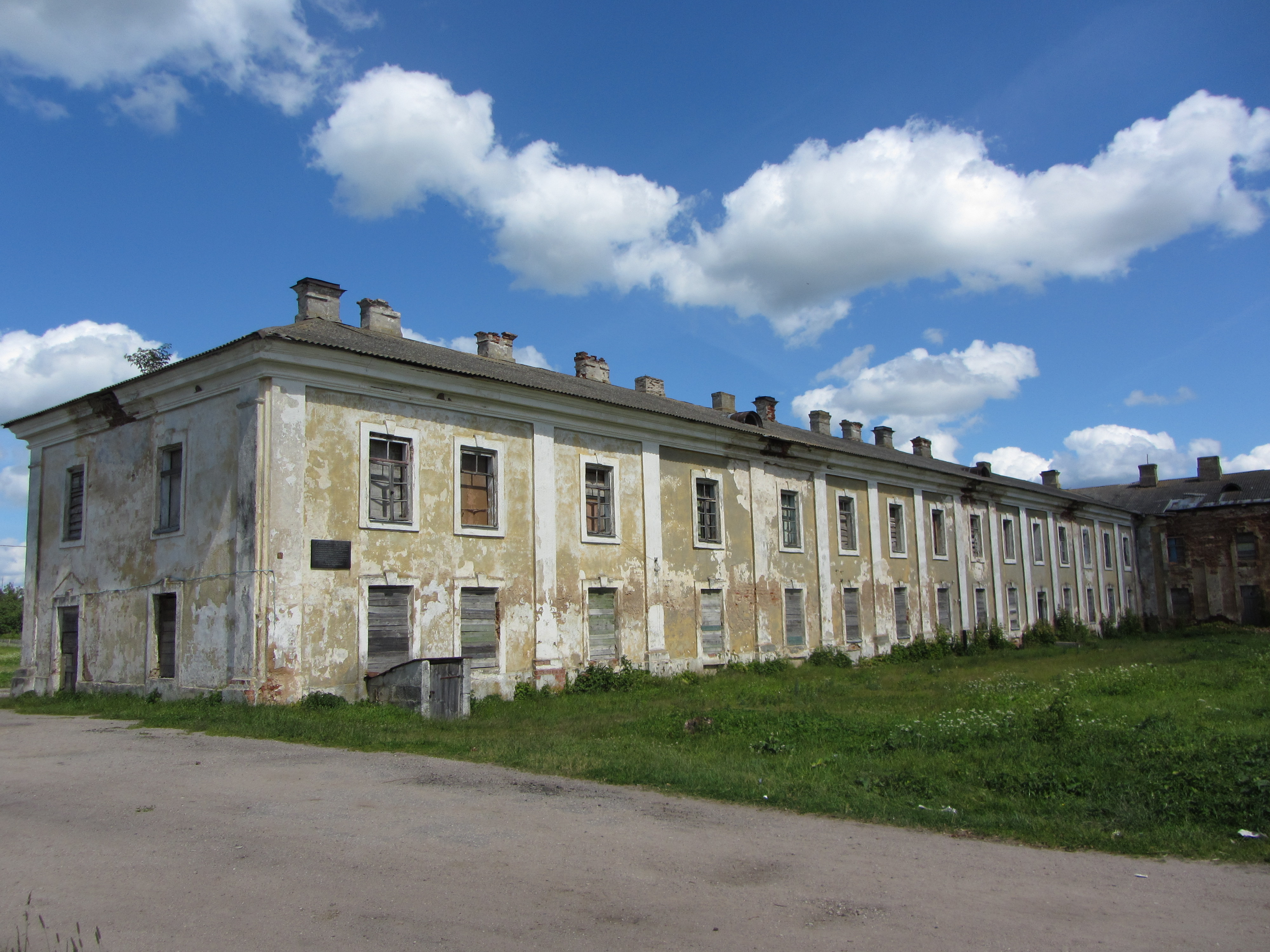 Беларуская (тарашкевіца): Манастыр базылянаў у Барунах, 2014 год.